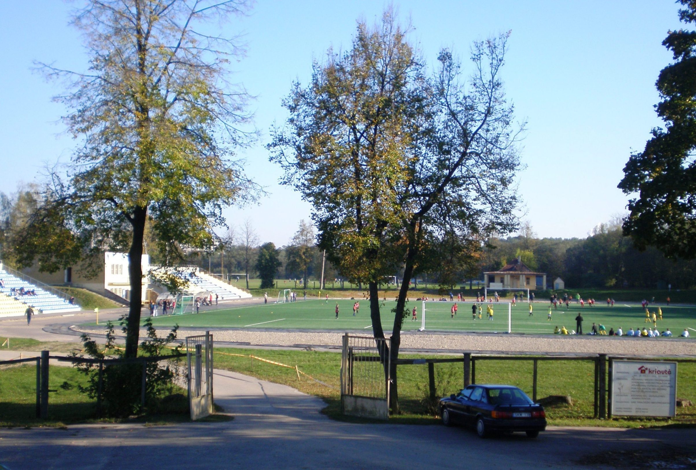 Kėdainių miesto stadionas